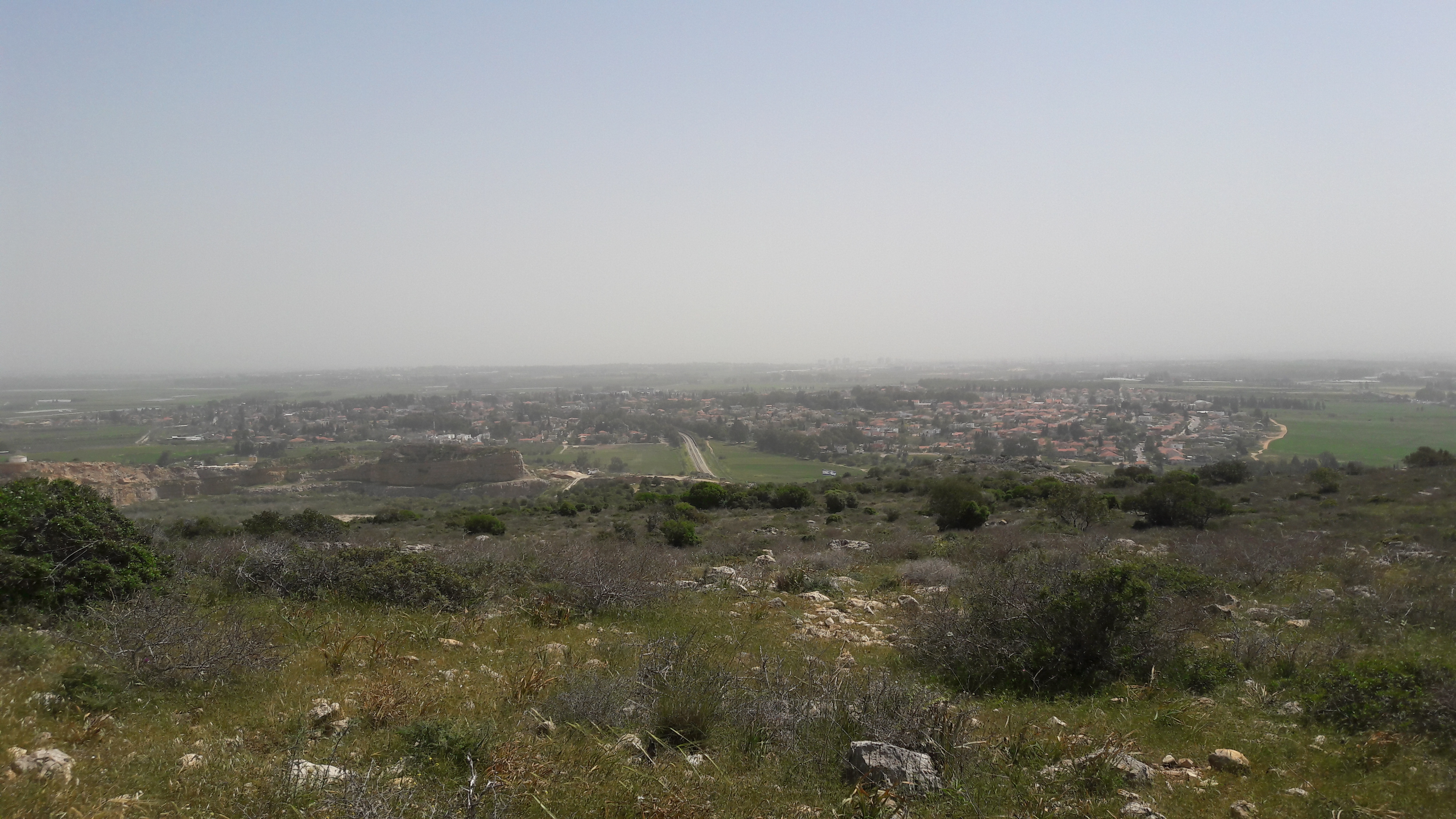 תמונה מהתצפית; ניתן לראות את בנימינה